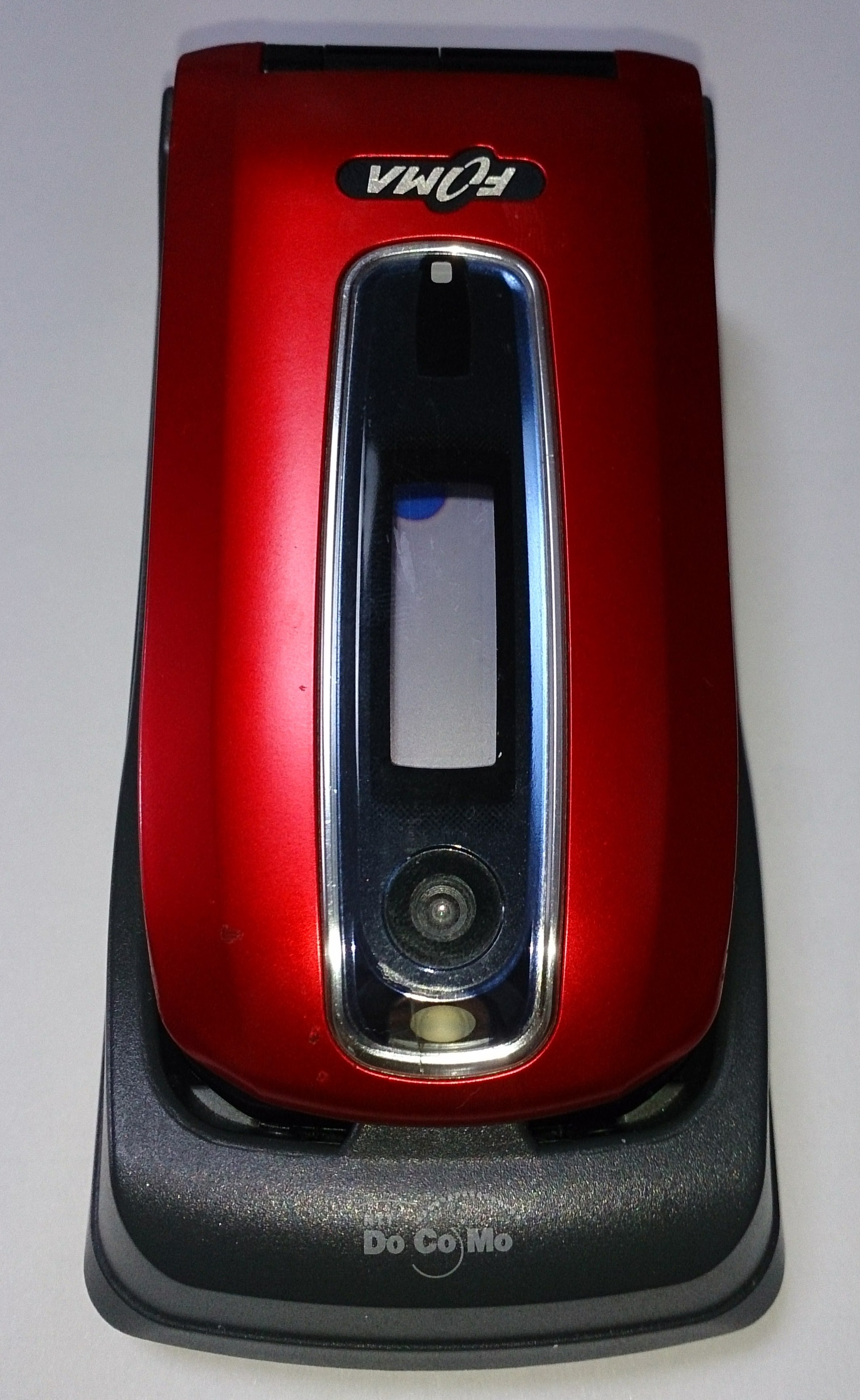 F2102V